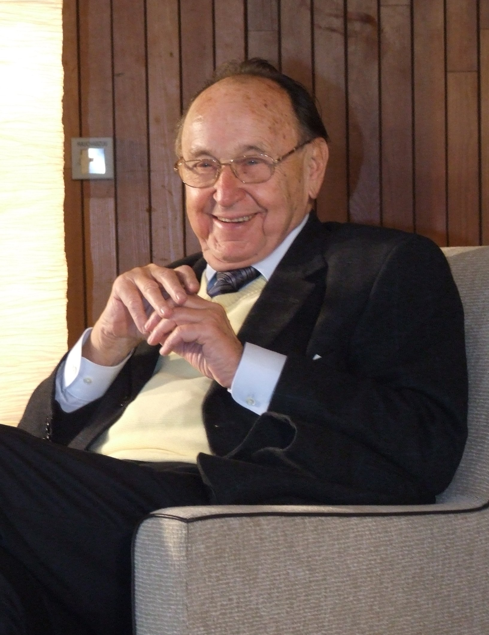 Hans-Dietrich Genscher, visit at the CJD Christophorusschule Königswinter